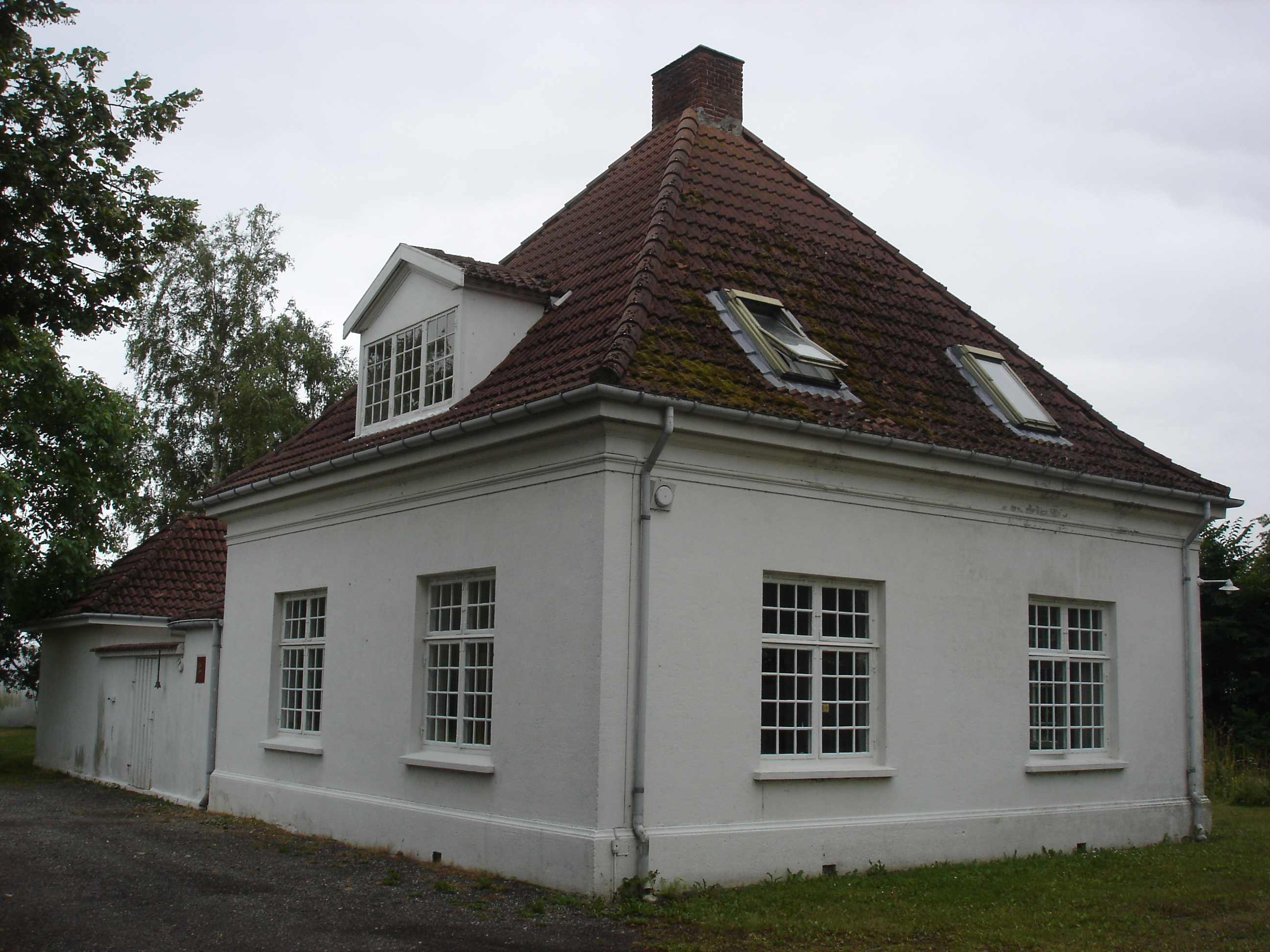 Åstrup Station